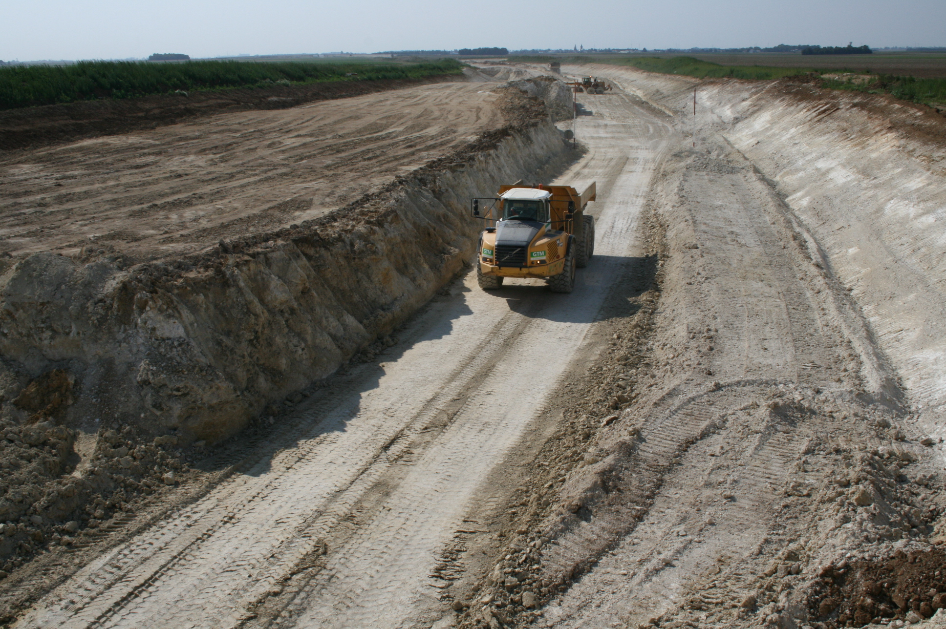 Autoroute A19 – Tombereau utilisé pour le transport des matériaux de terrassements